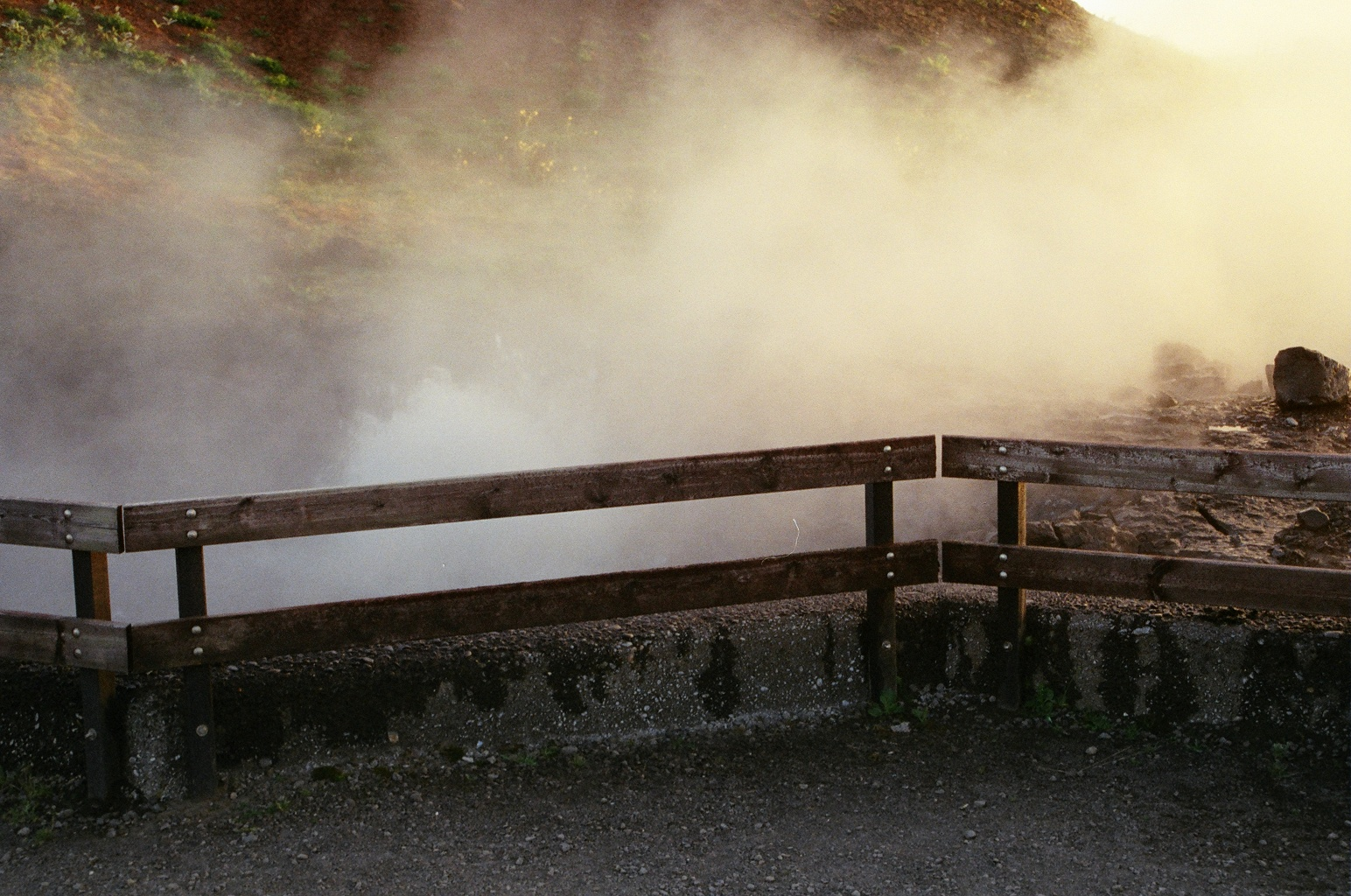 Springquelle Deildartunguhver in Westisland